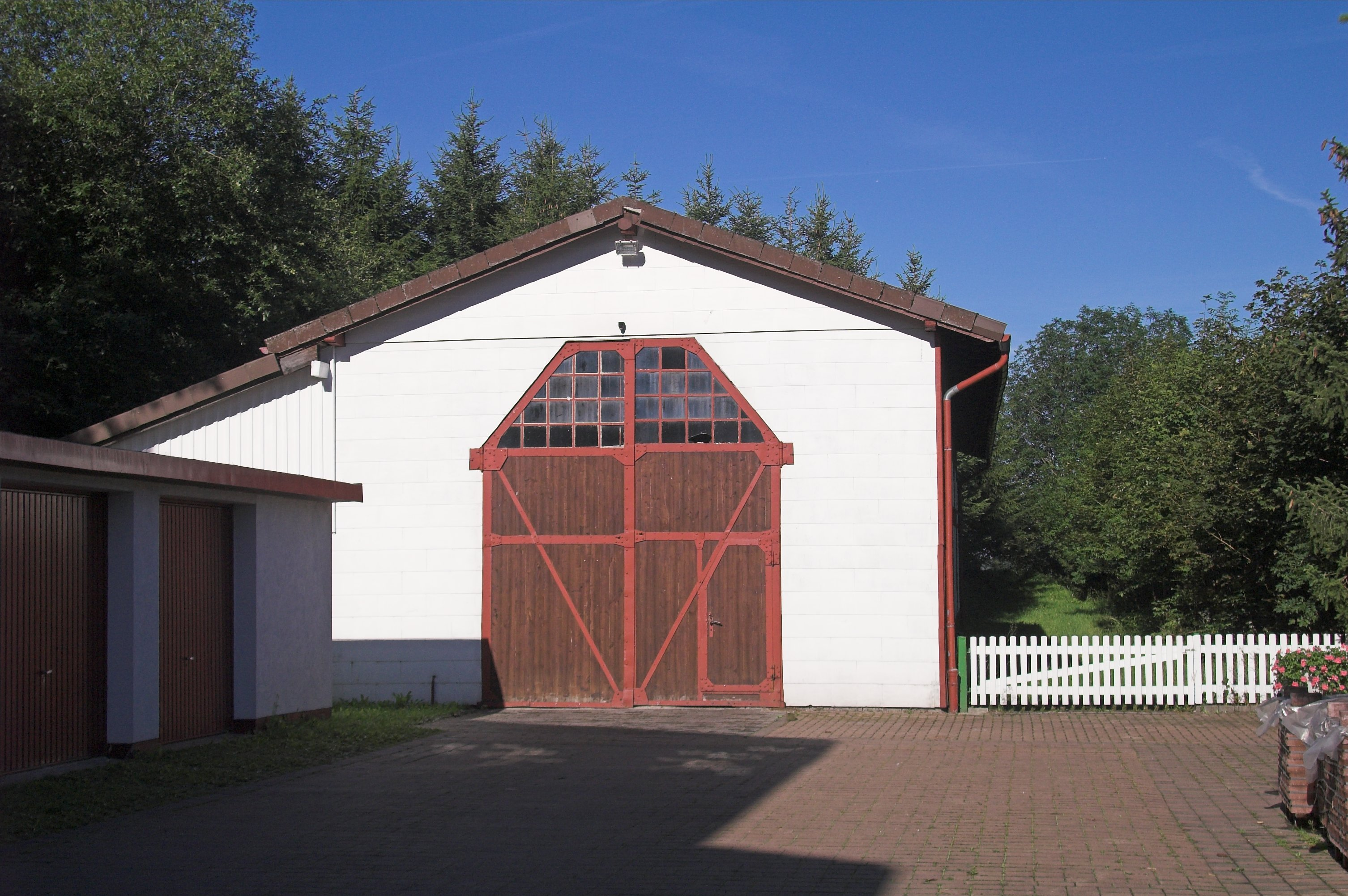 Ehemaliger Lokschuppen der Sankt Andreasberger Kleinbahn